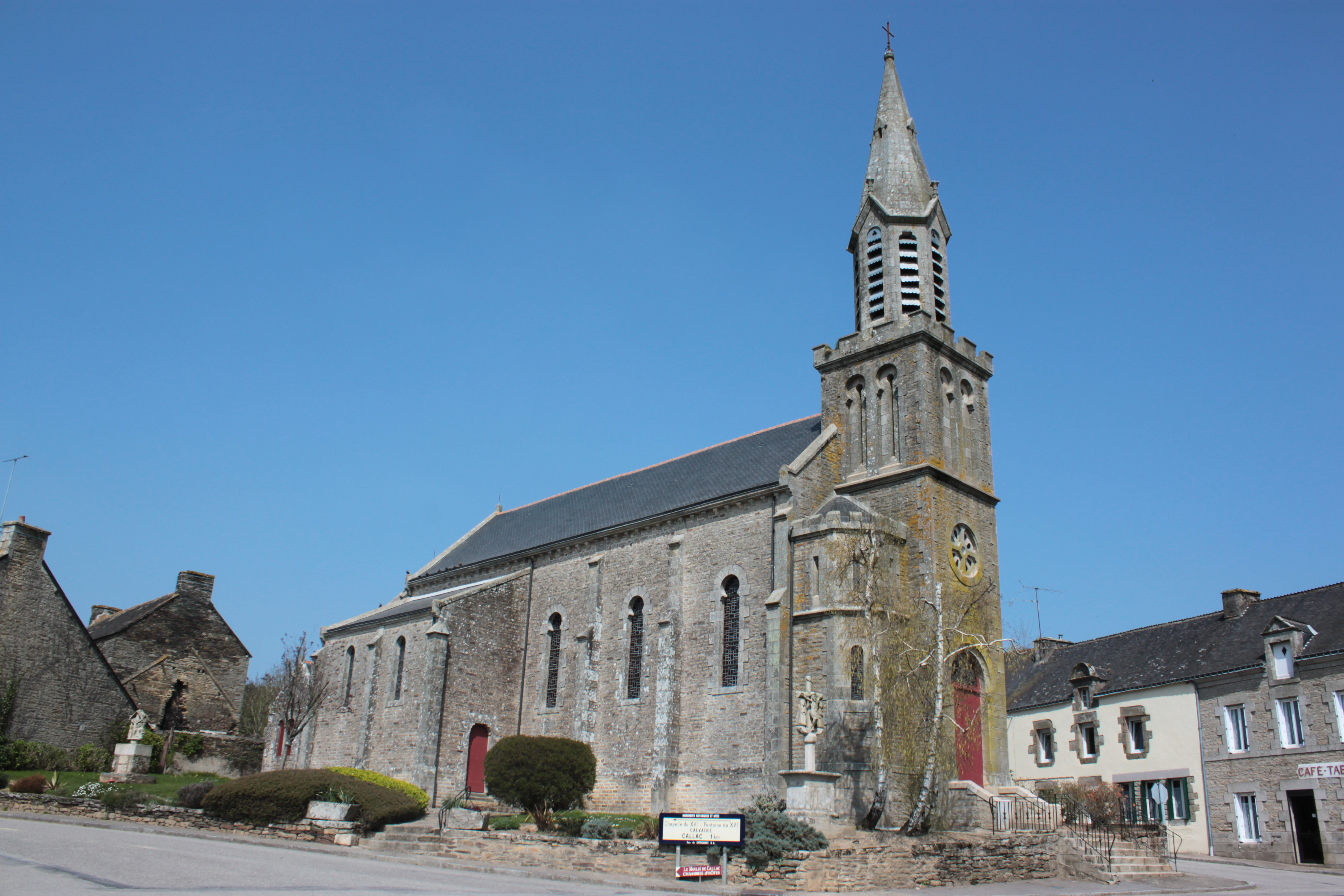 Église de Callac, Fr-56-Plumelec.